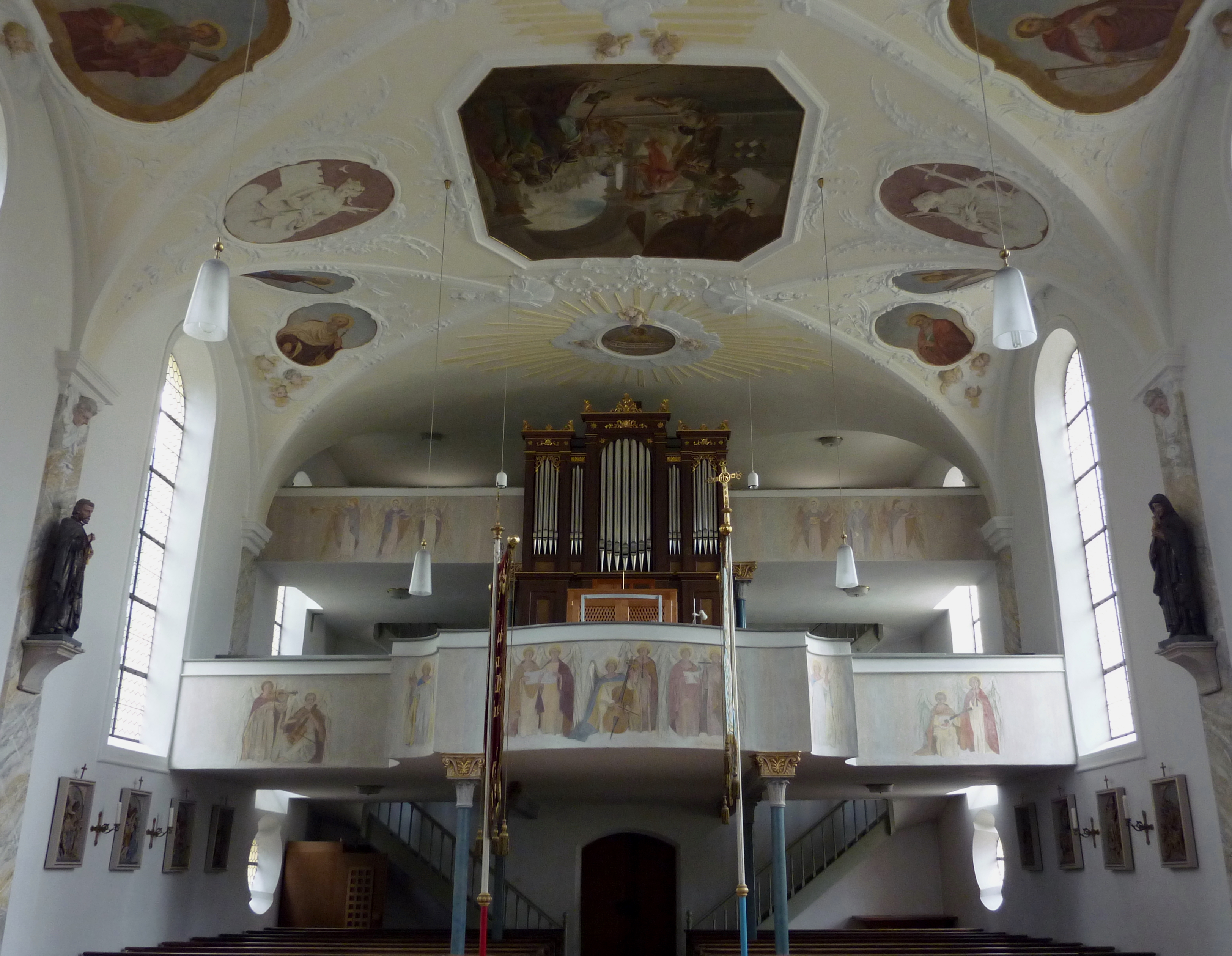 Katholische Pfarrkirche St. Stephanus in Hainhofen (Neusäß), Innenraum mit Blick zur Orgelempore, Steinmeyer-Orgel von 1878, 2009 restauriert